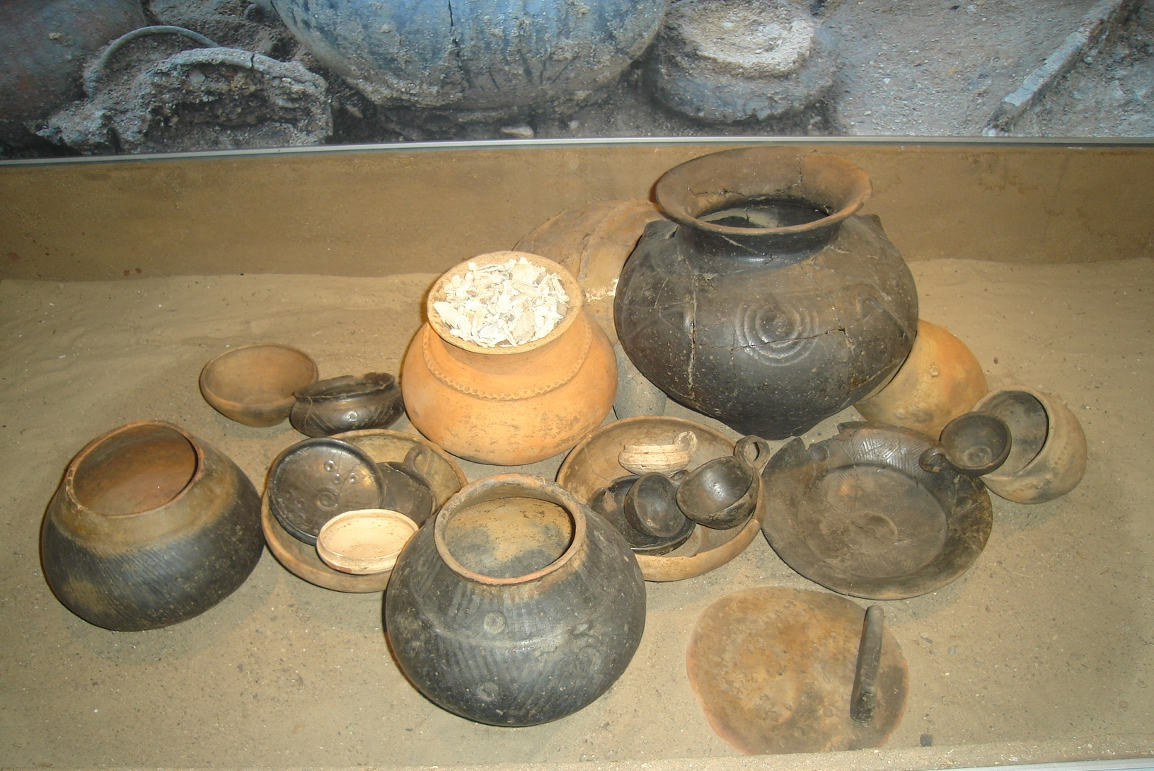 Popielnice i dostawione do nich naczynia z kultury łużyckiej.